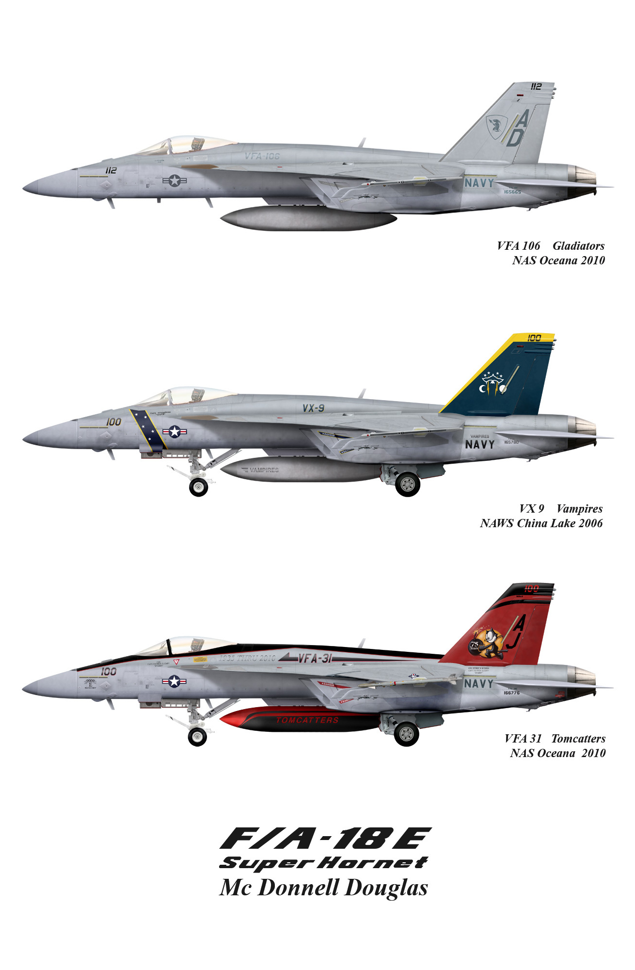 F/A 18 E super hornet color scheme